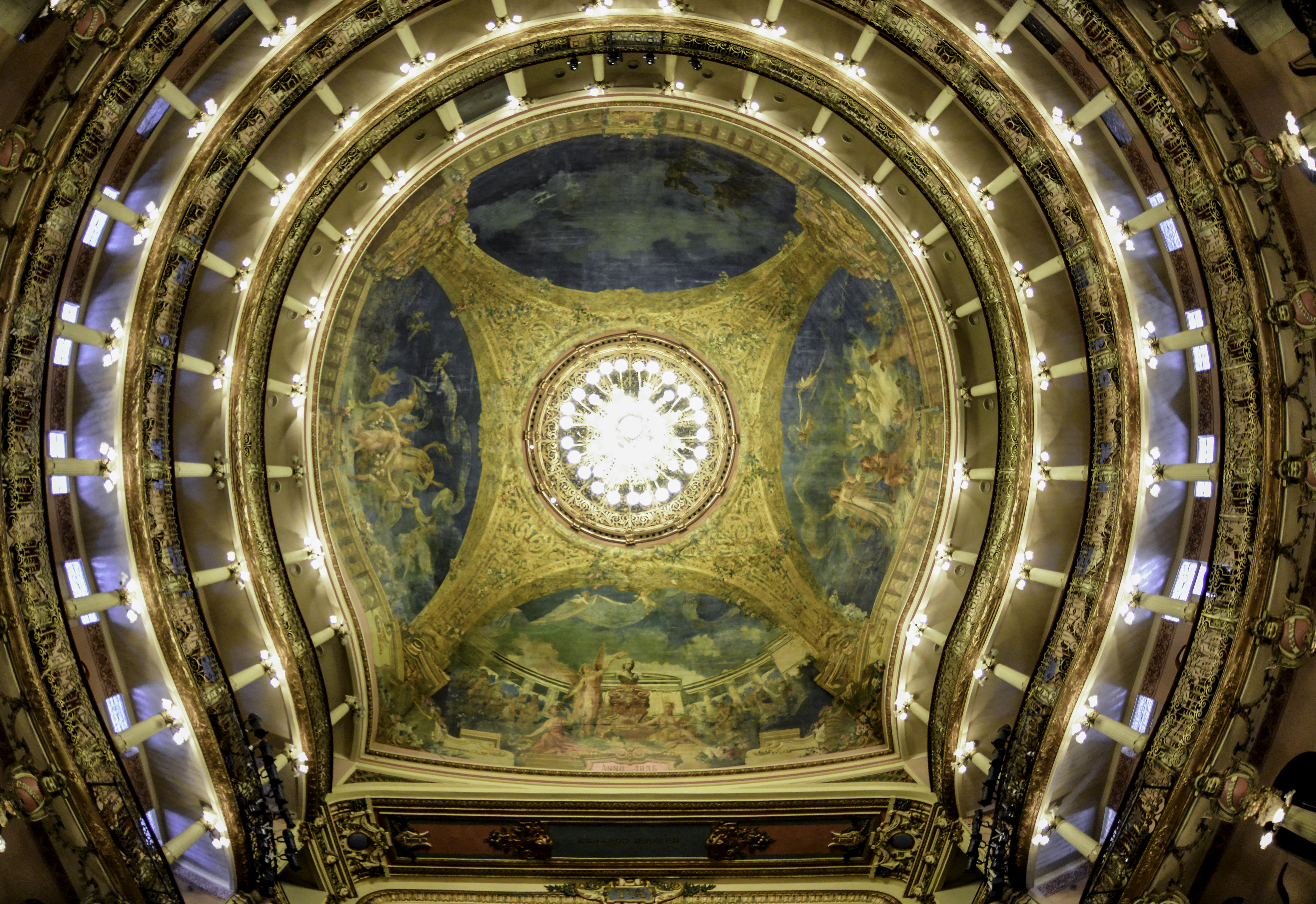 Teto do teatro Amazonas simbolizando ops pés da Torre Eifell. Pinturas e arquitetura trazidas da Europa no período aureo da borracha no final do Século XX